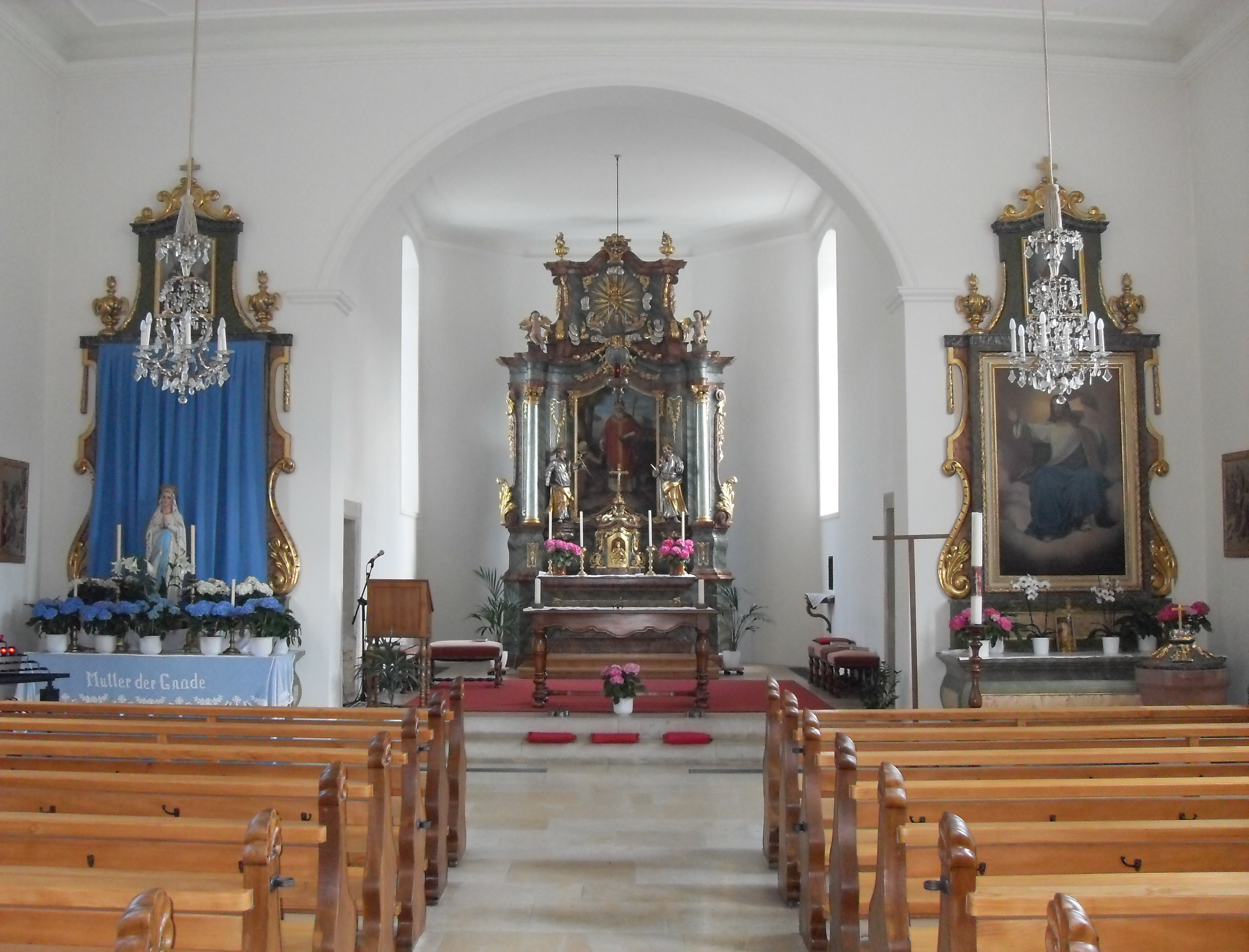 Innenansicht der Kirche St. Martin in Büren, Kanton Solothurn, Schweiz